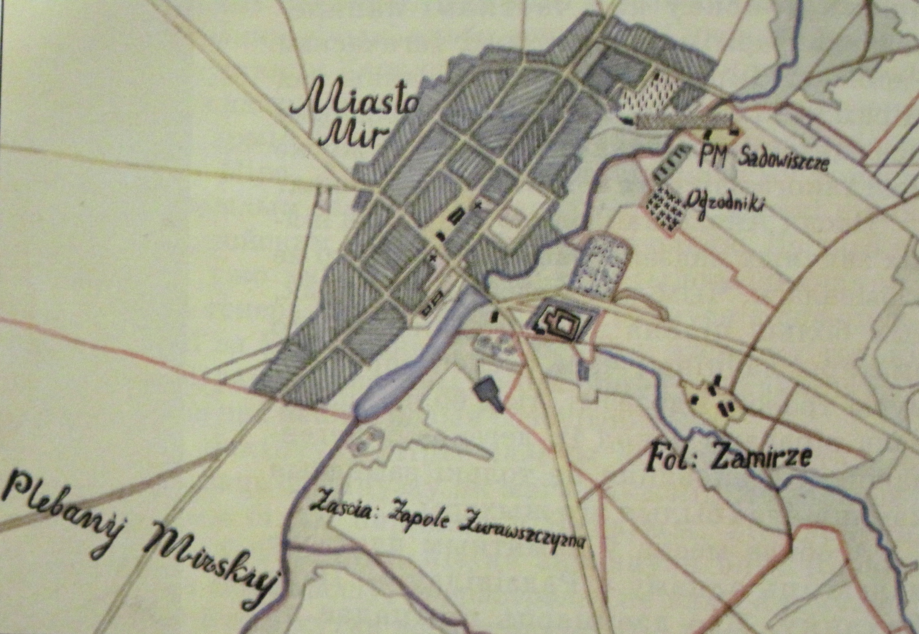 Адлюстраванне Мірскага замка на мапе Мірскага графства ў 1830 годзе